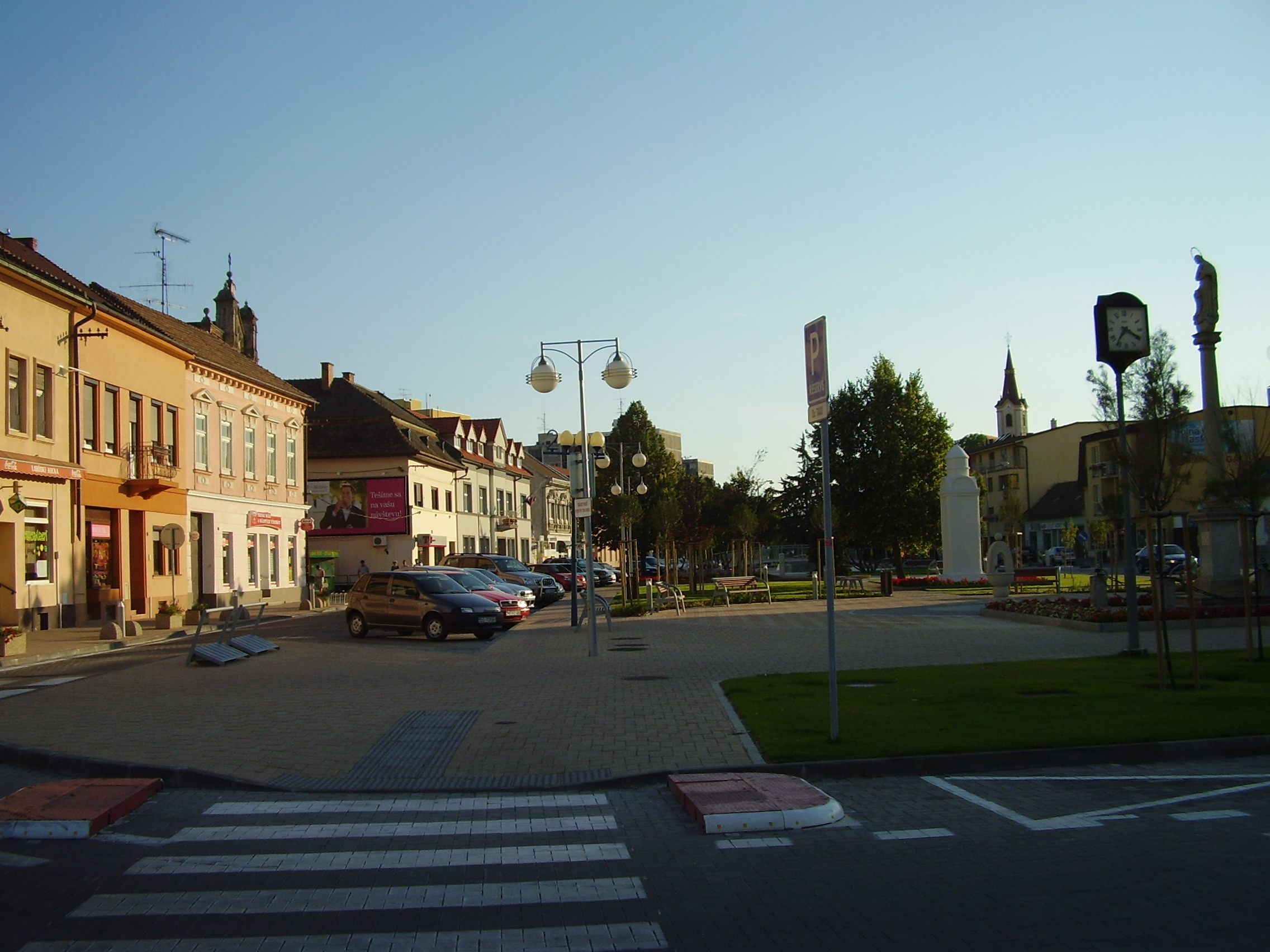 Senec